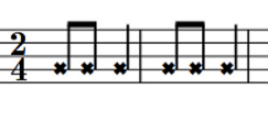 Rythme habituel du pas dans une bourrée à deux temps.